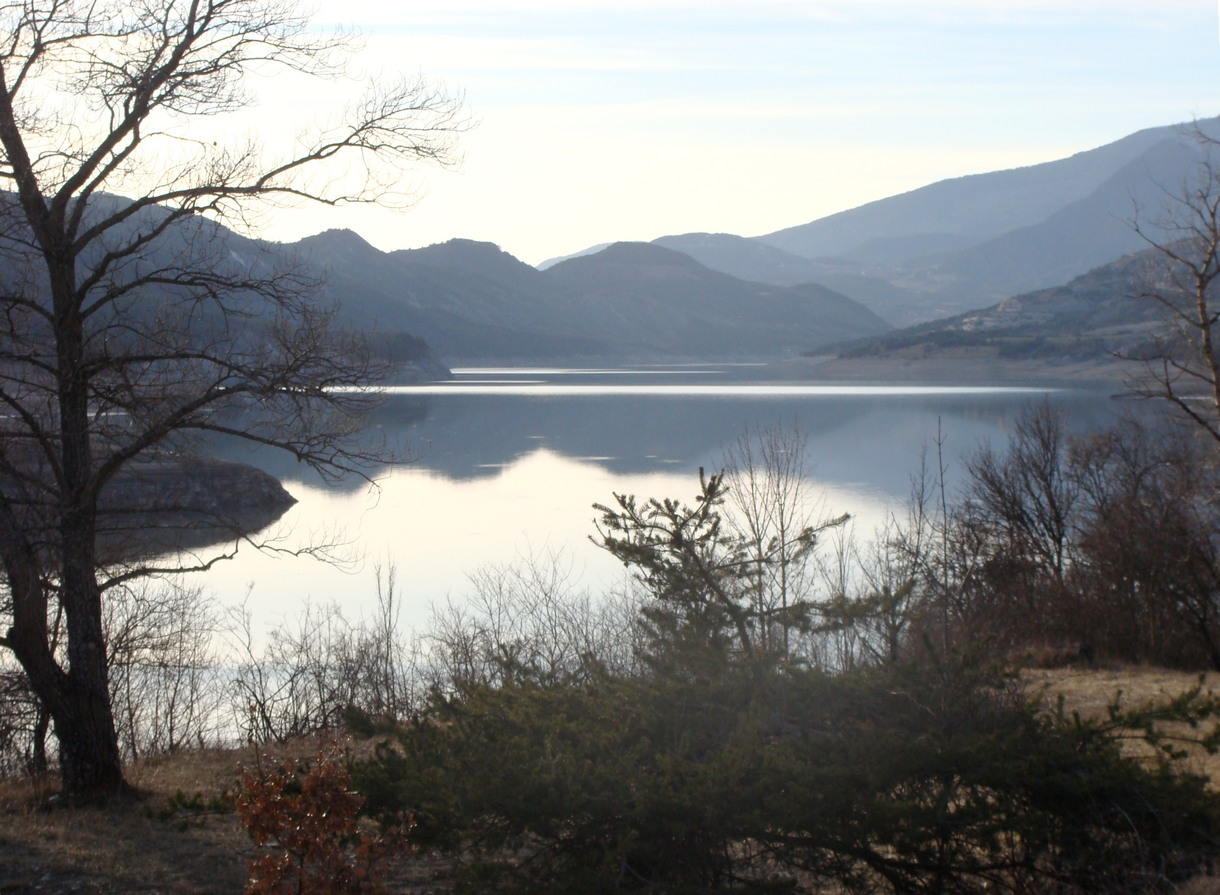 Le plan d'eau de Serre-Ponçon, branche de l'Ubaye, à la hauteur de l'ancien village d'Ubaye.